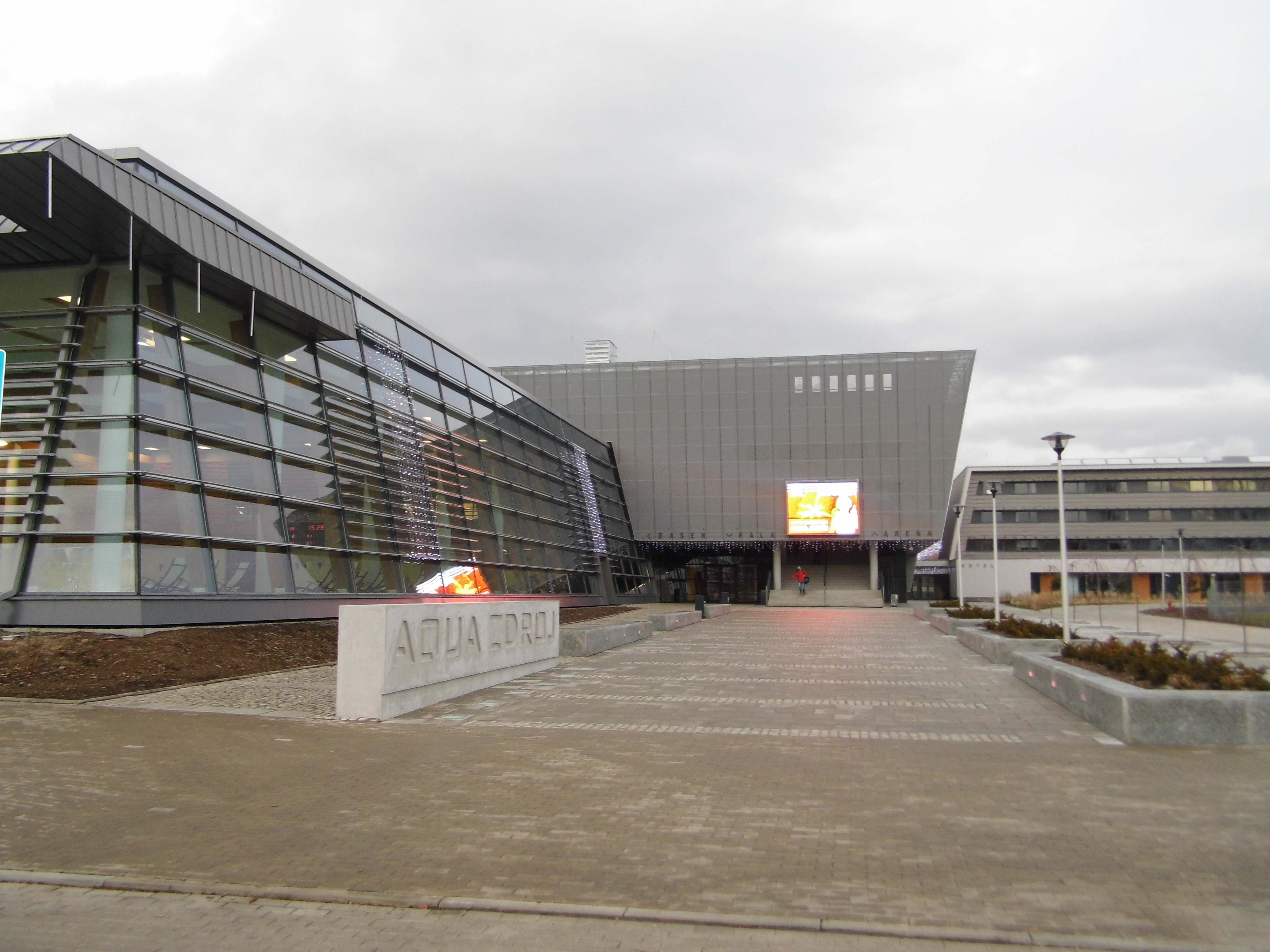 Centrum sportowo rekreacyjne Aqua Zdrój w Wałbrzychu